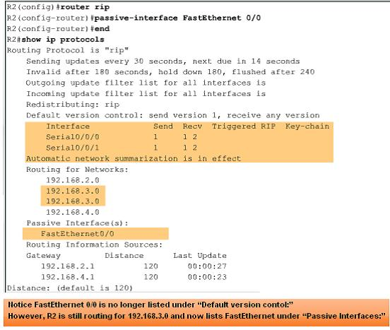 Монгол: kk